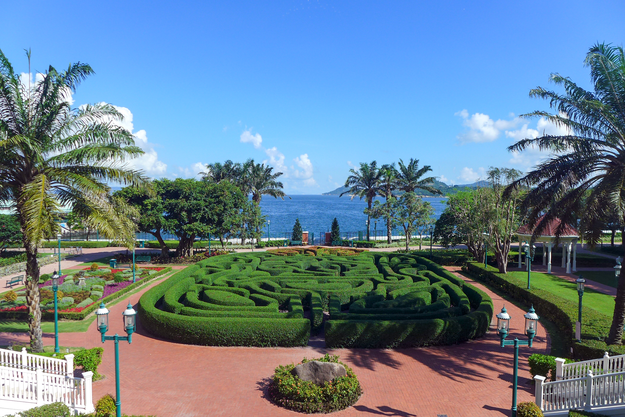 Hong Kong Disneyland Hotel